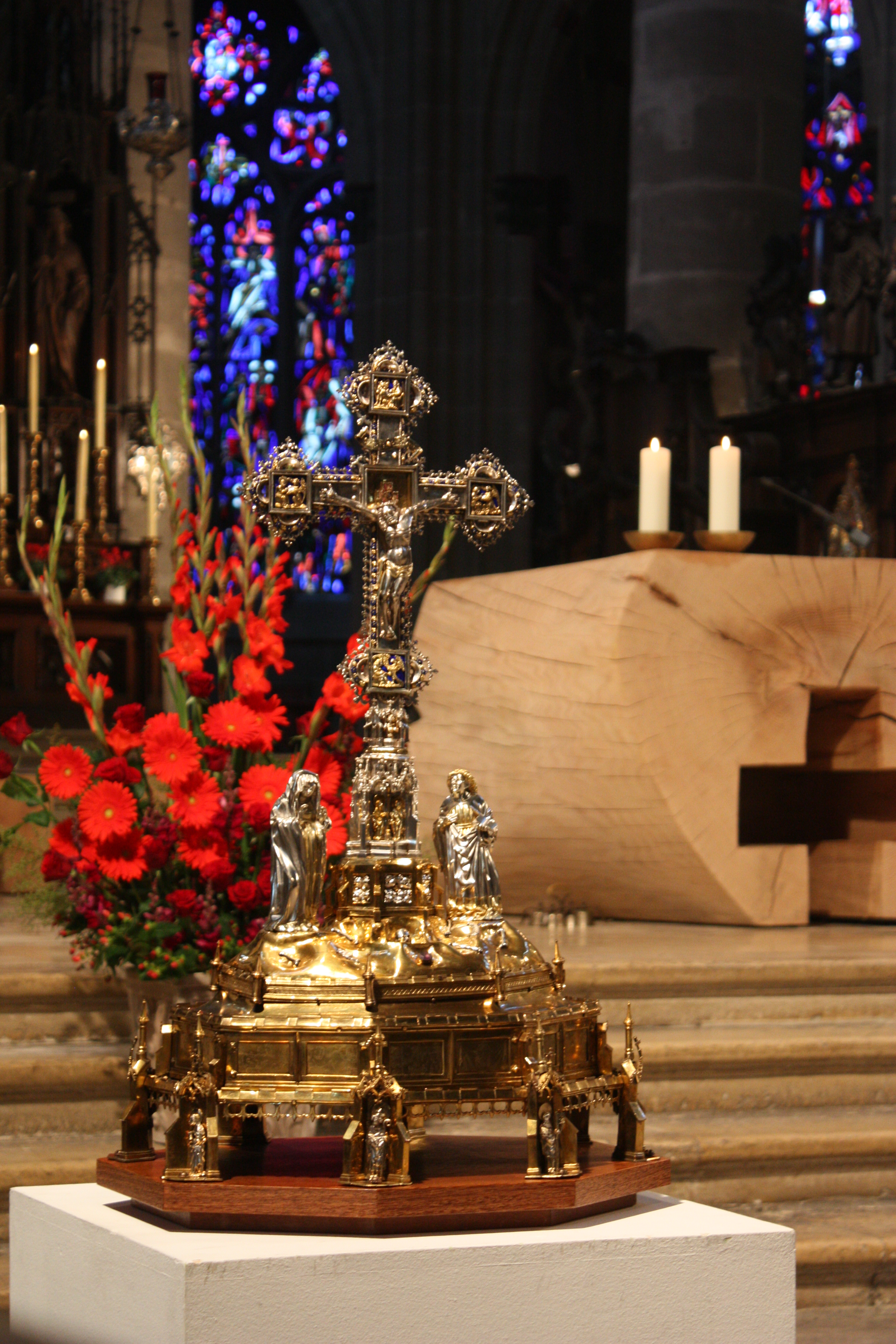 Das Hl.-Kreuz-Reliquiar von 1440 des Hl. Kreuz Münsters Schwäbisch Gmünd